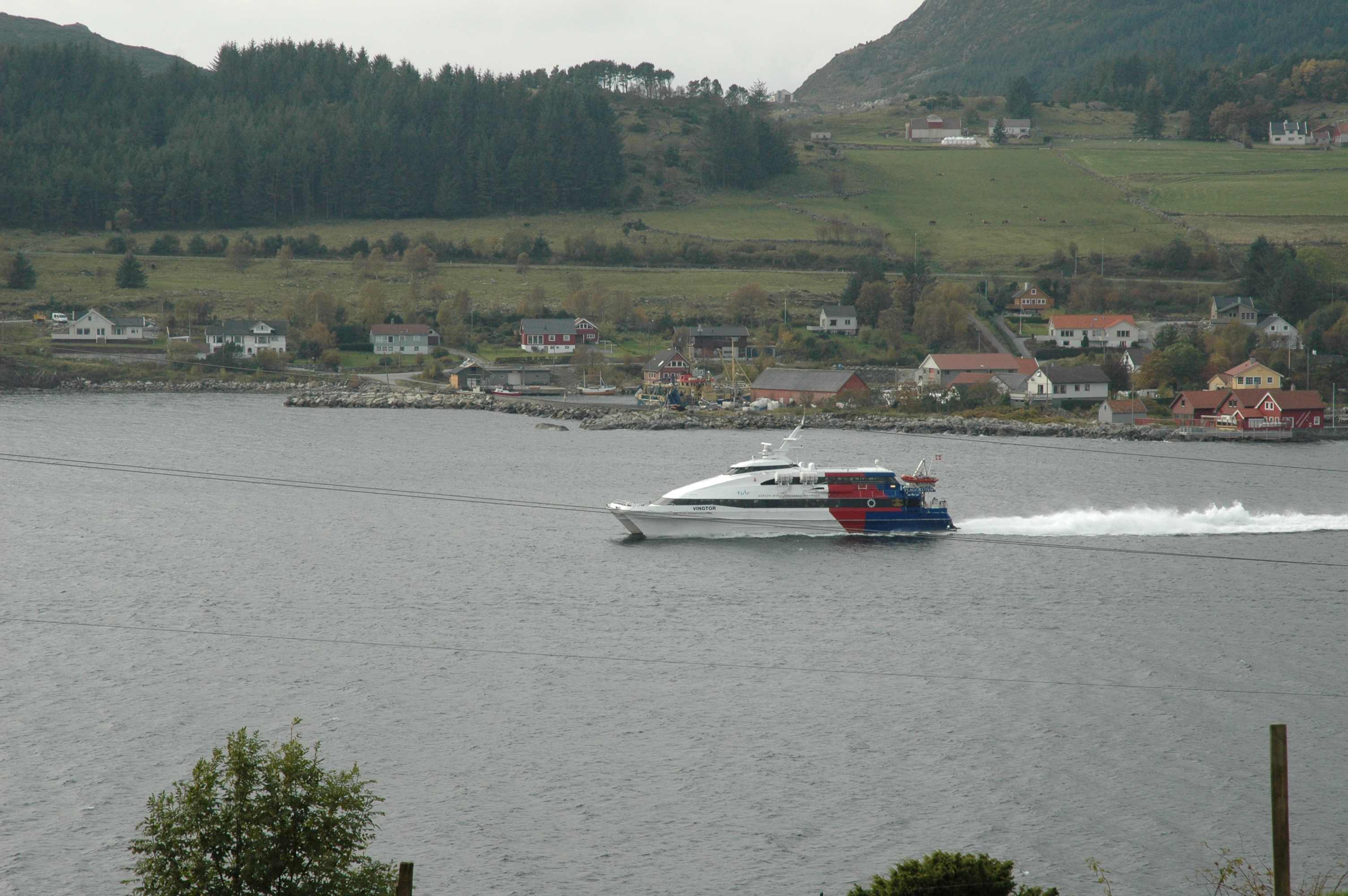 Vingtor i Boknasundet